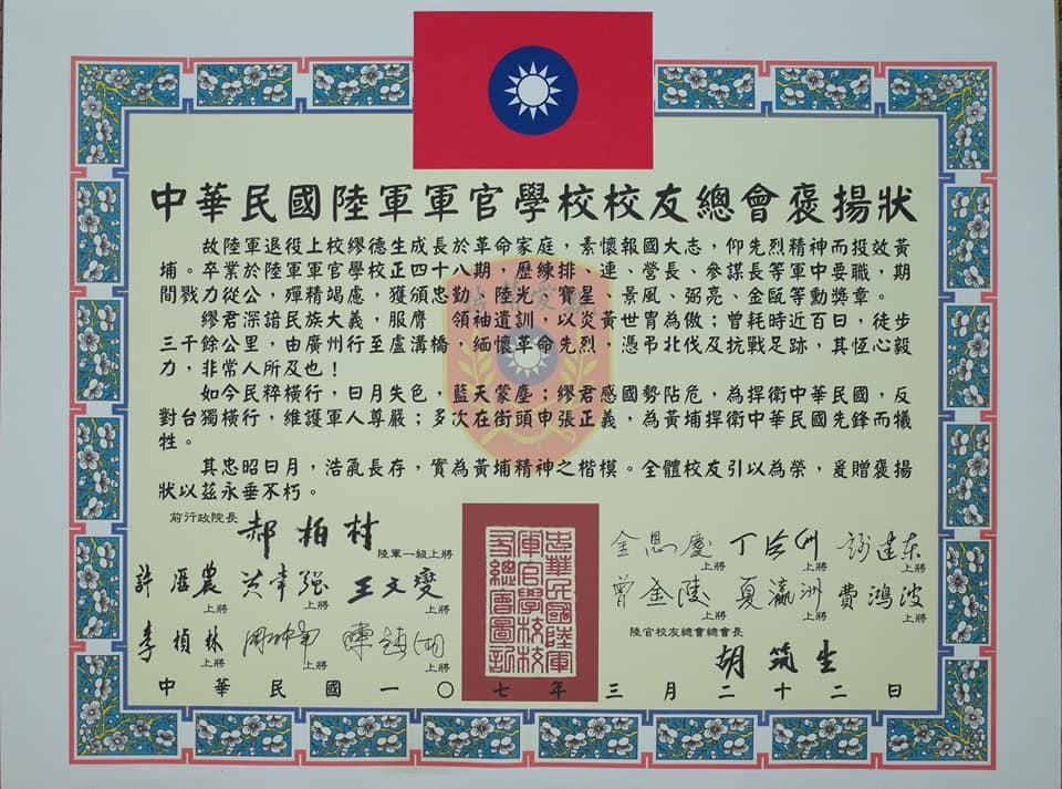 繆德生公祭會場拍攝陸軍官校校友總會褒揚狀